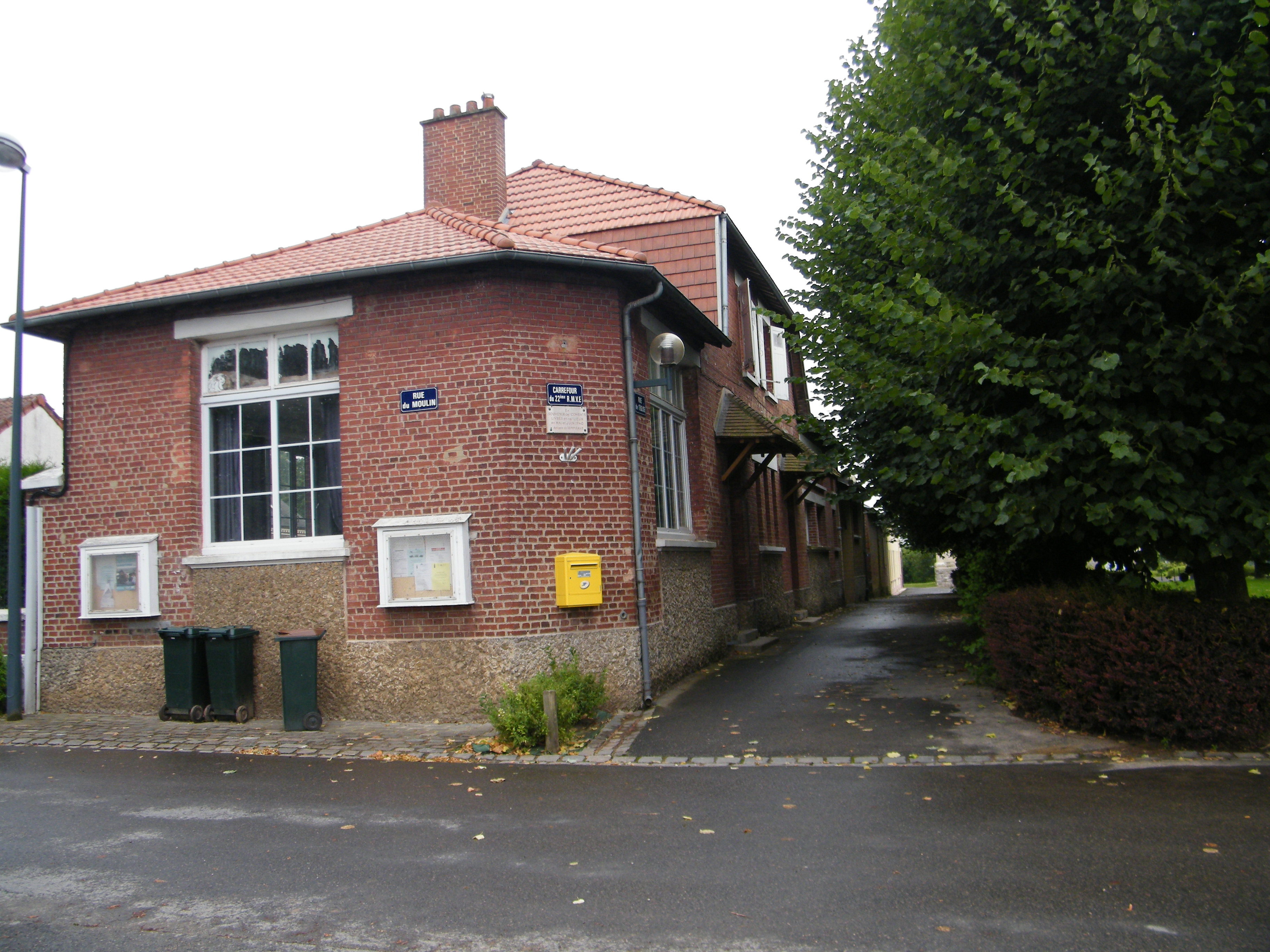 Mairie.